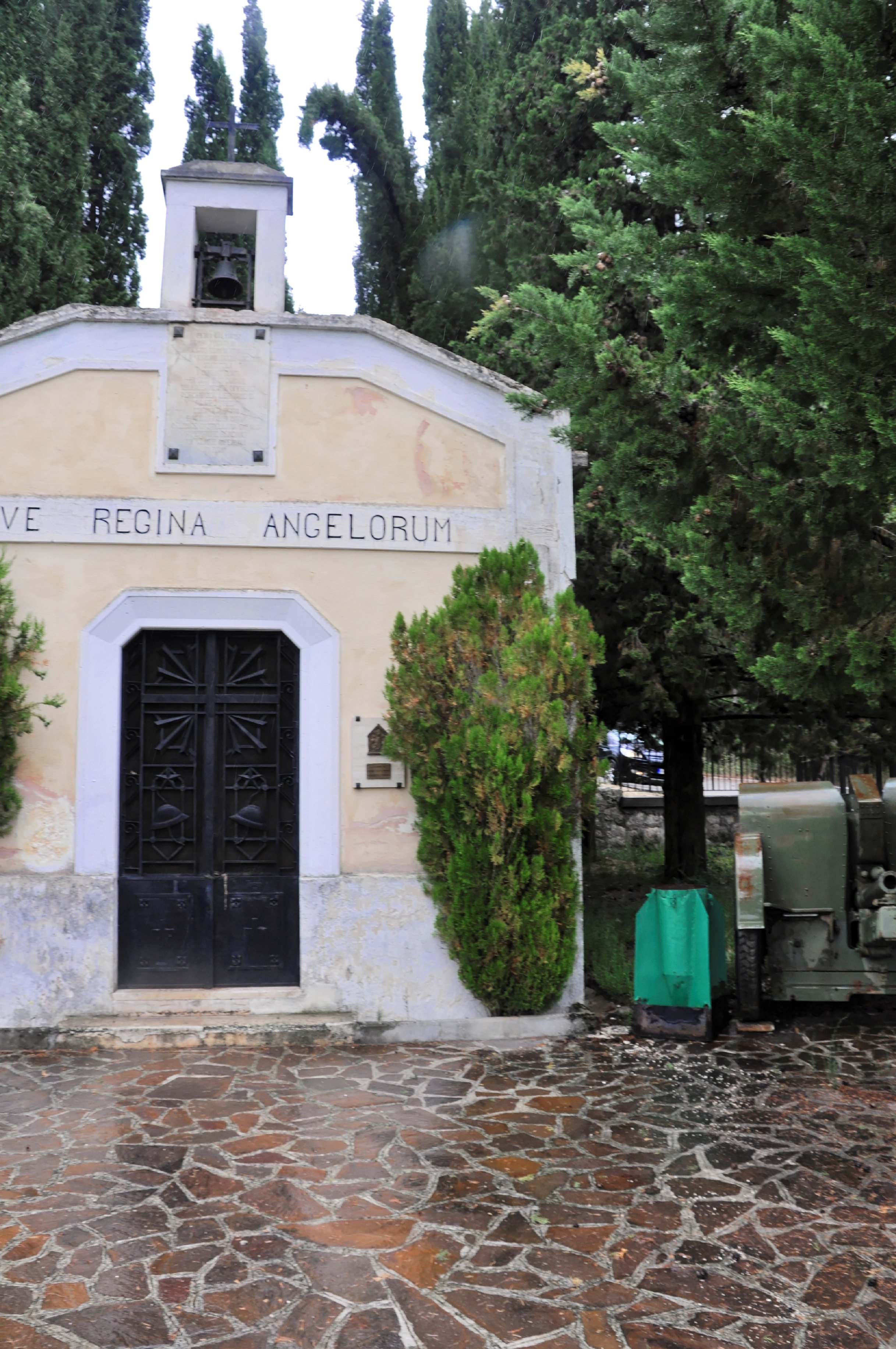 Sulmona 2013